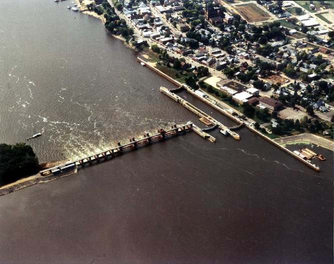 Mississippi River Lock and Dam number 10 near Guttenberg, Iowa